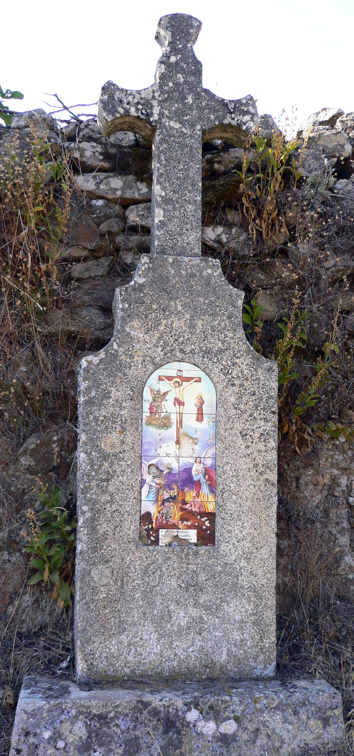 Premier des quatre calvaires du vilage photo prise par moi même, le 18/08/2005